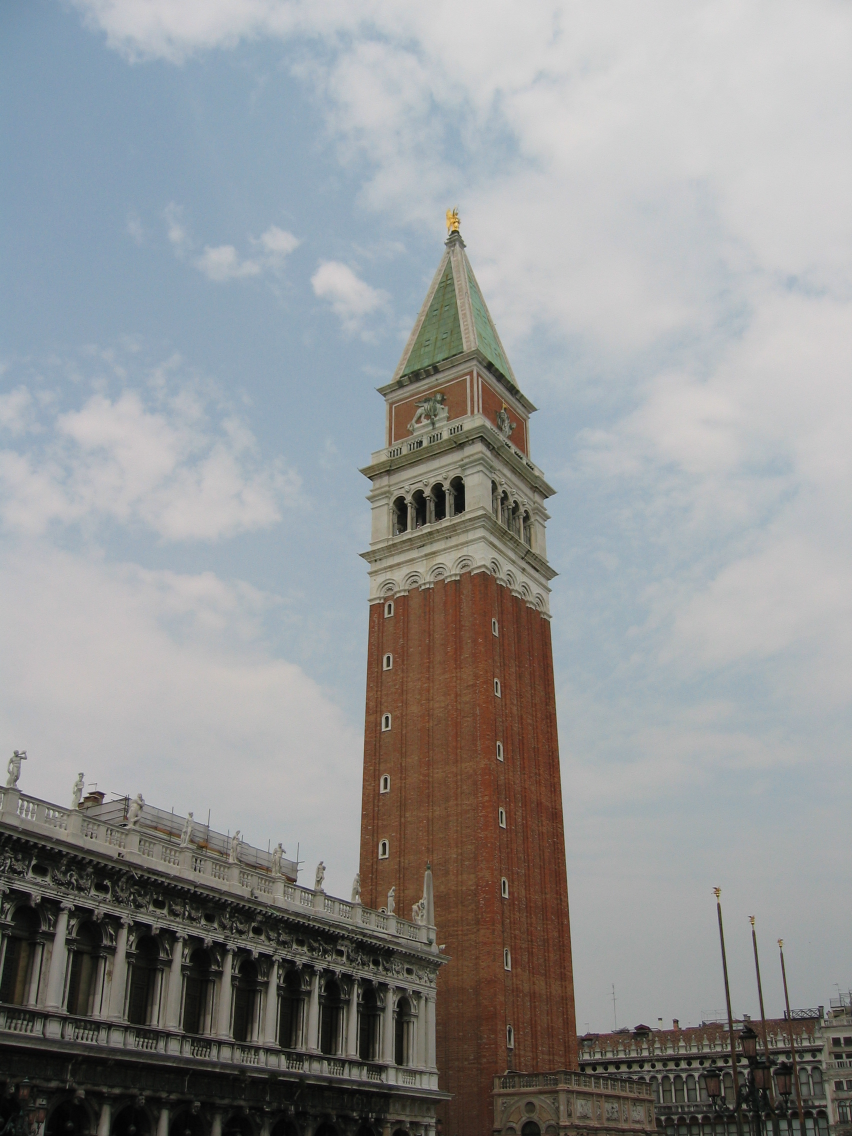 Venedig